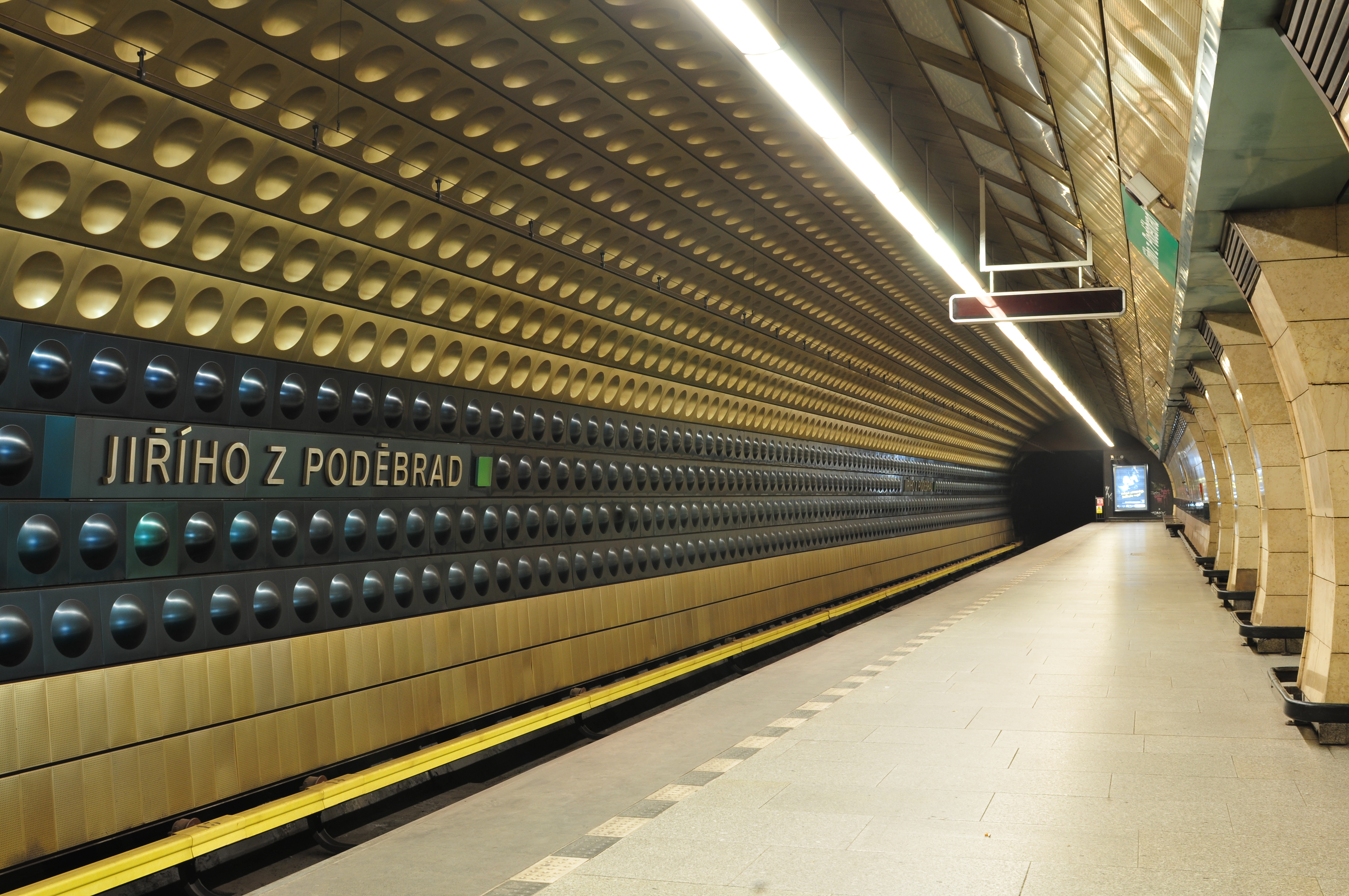 Metro Praha